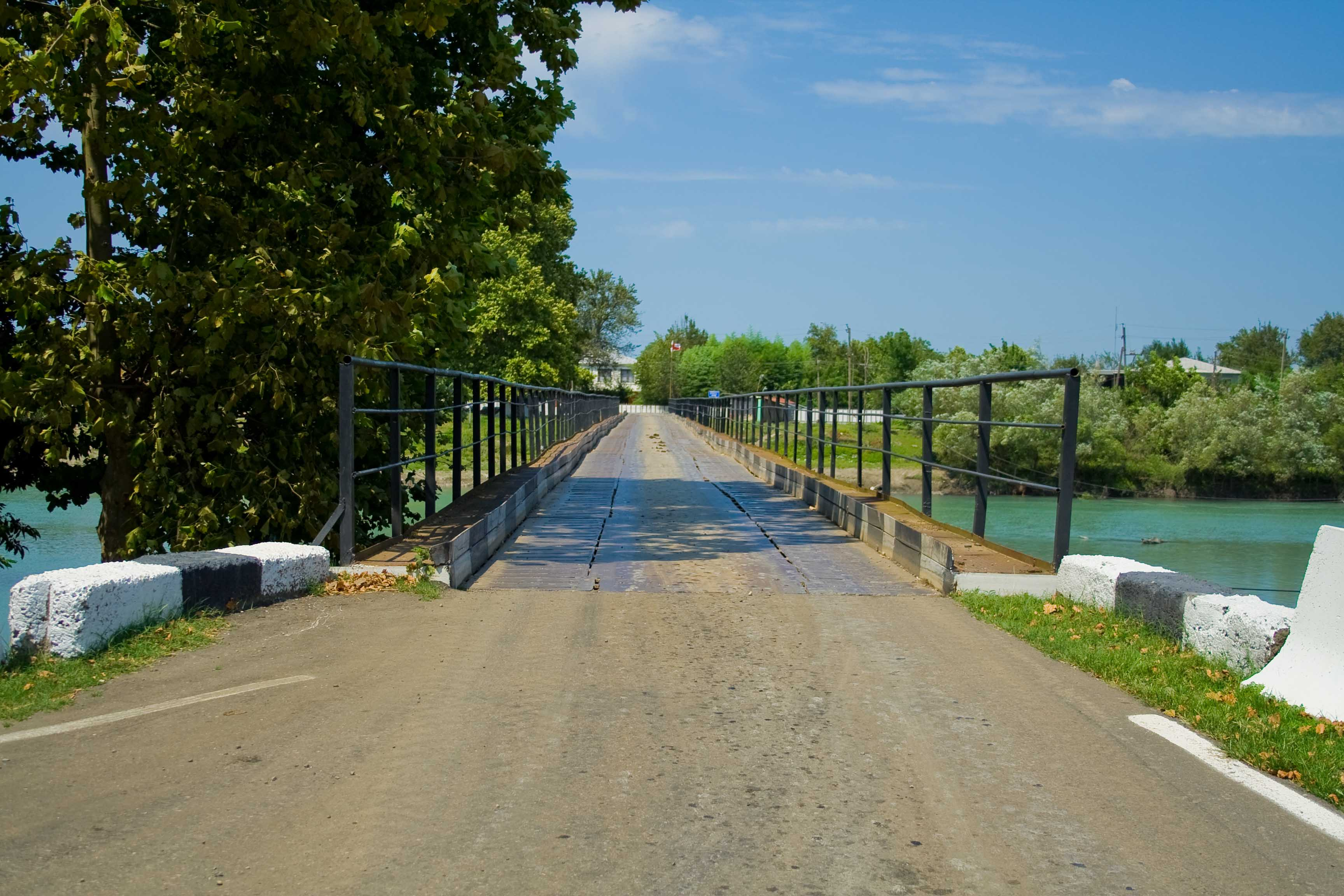 Enguri bridge